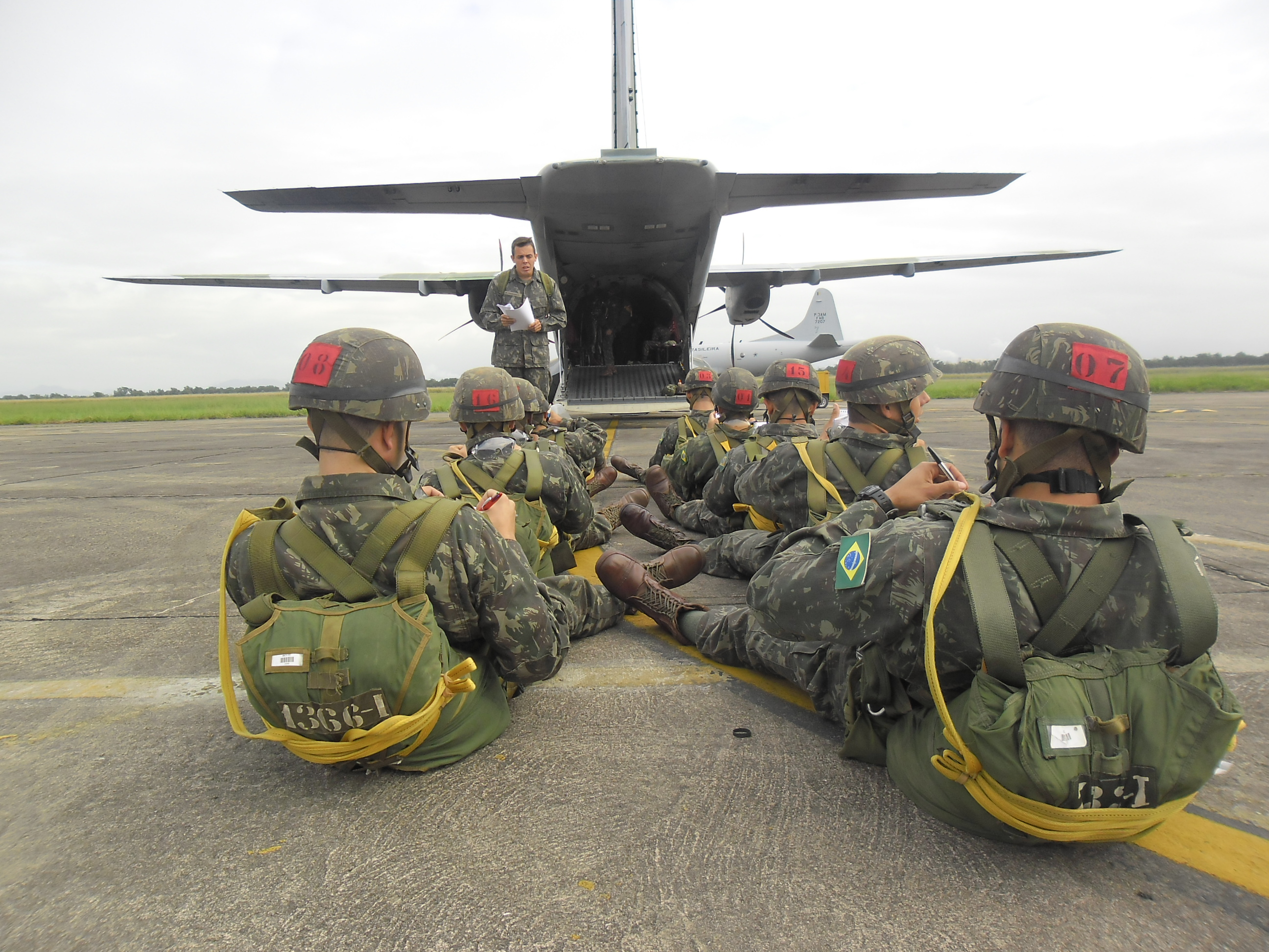 Fase de Lançamento precursor